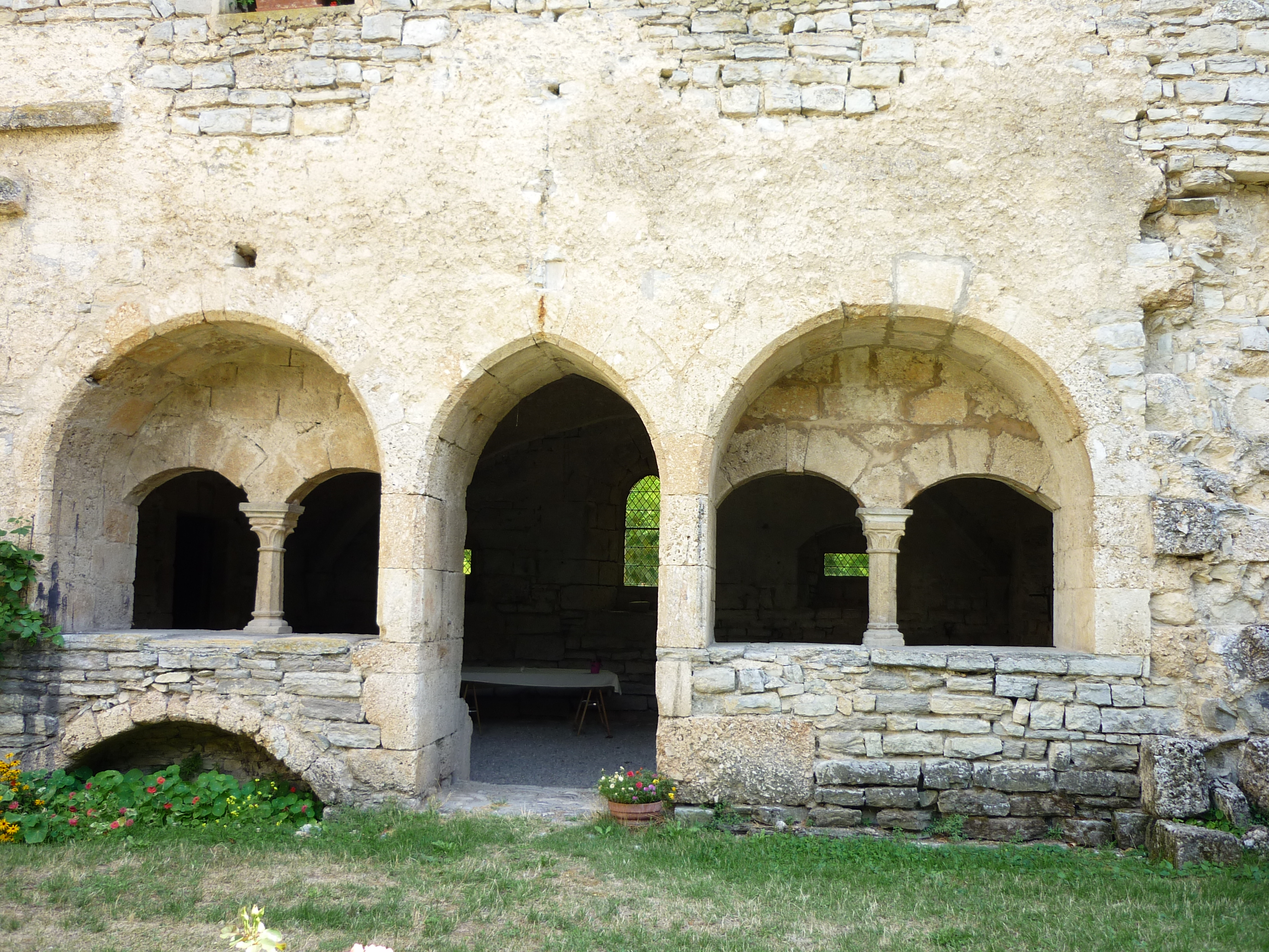 Kloster Valcroissant, Kapitelsaal von Westen